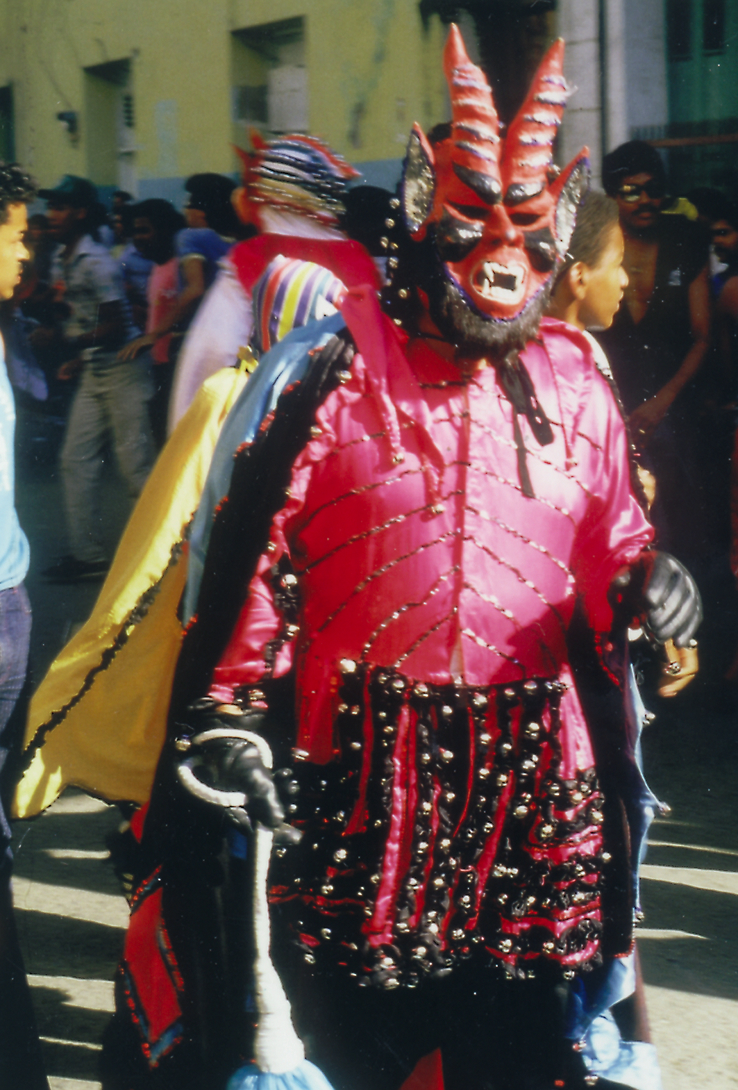 Diablo Cojuelo, Karnevalskostum in La Vega, Dominikanische Republik Diablo Cojuelo, Carnivals suit in La Vega, Dominican Republic Own foto, taken in 1987